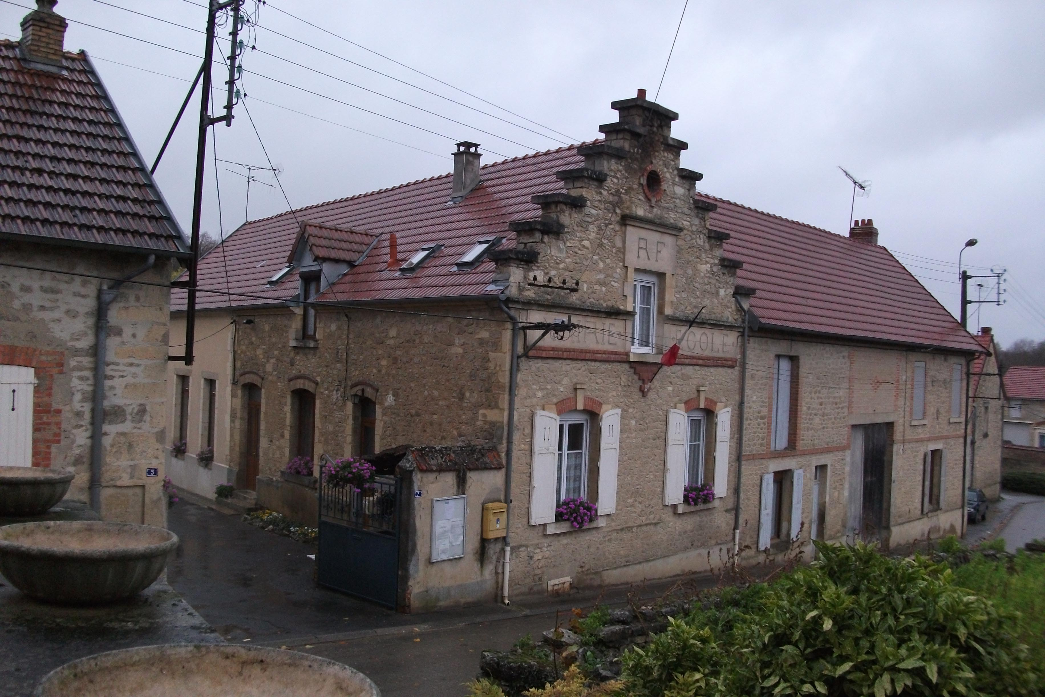 la mairie d'Hourges vue depuis l'église.